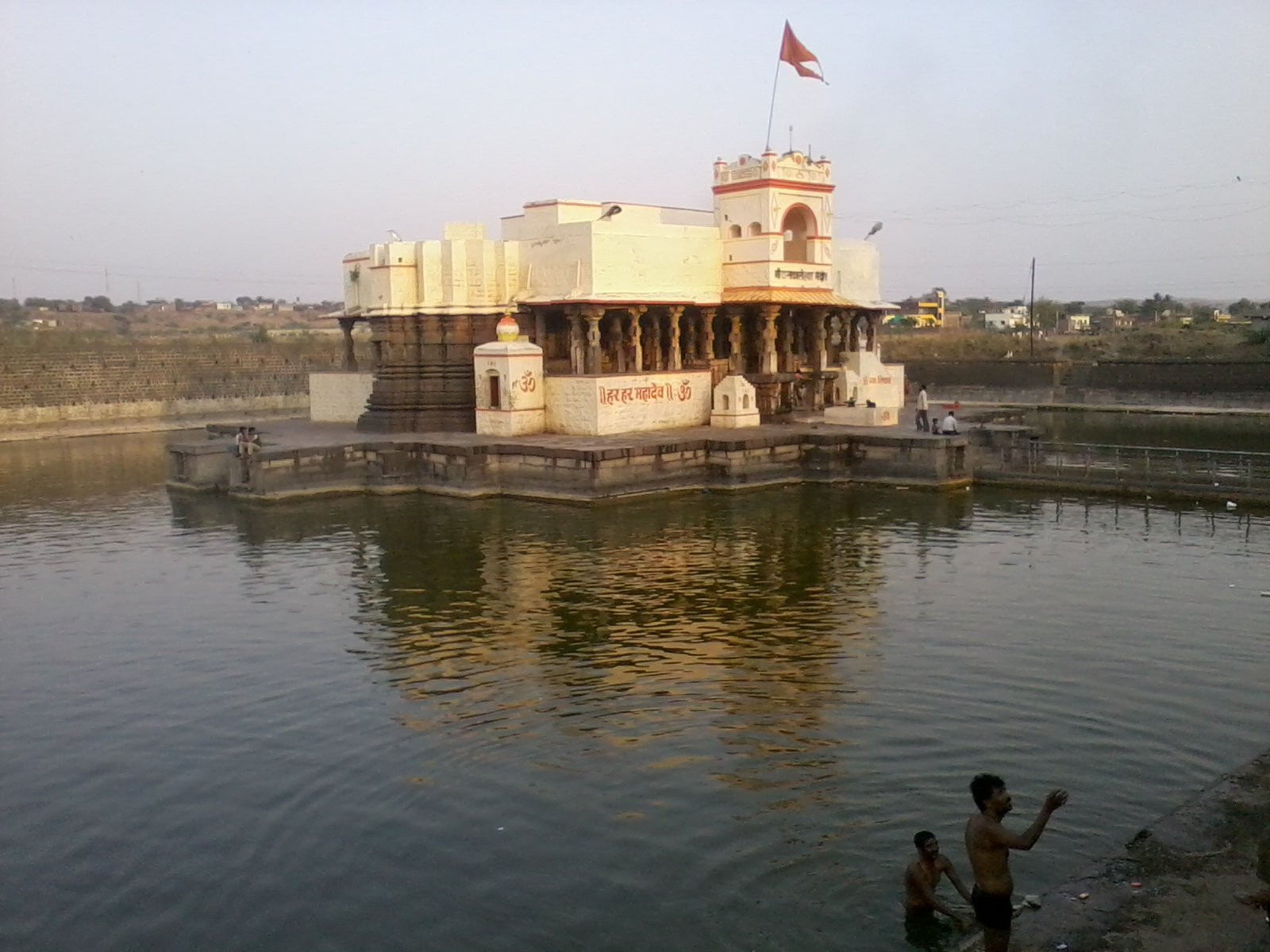 Kankaleshwar Temple at Beed in Indian state Maharashtra built during Chalukyan period